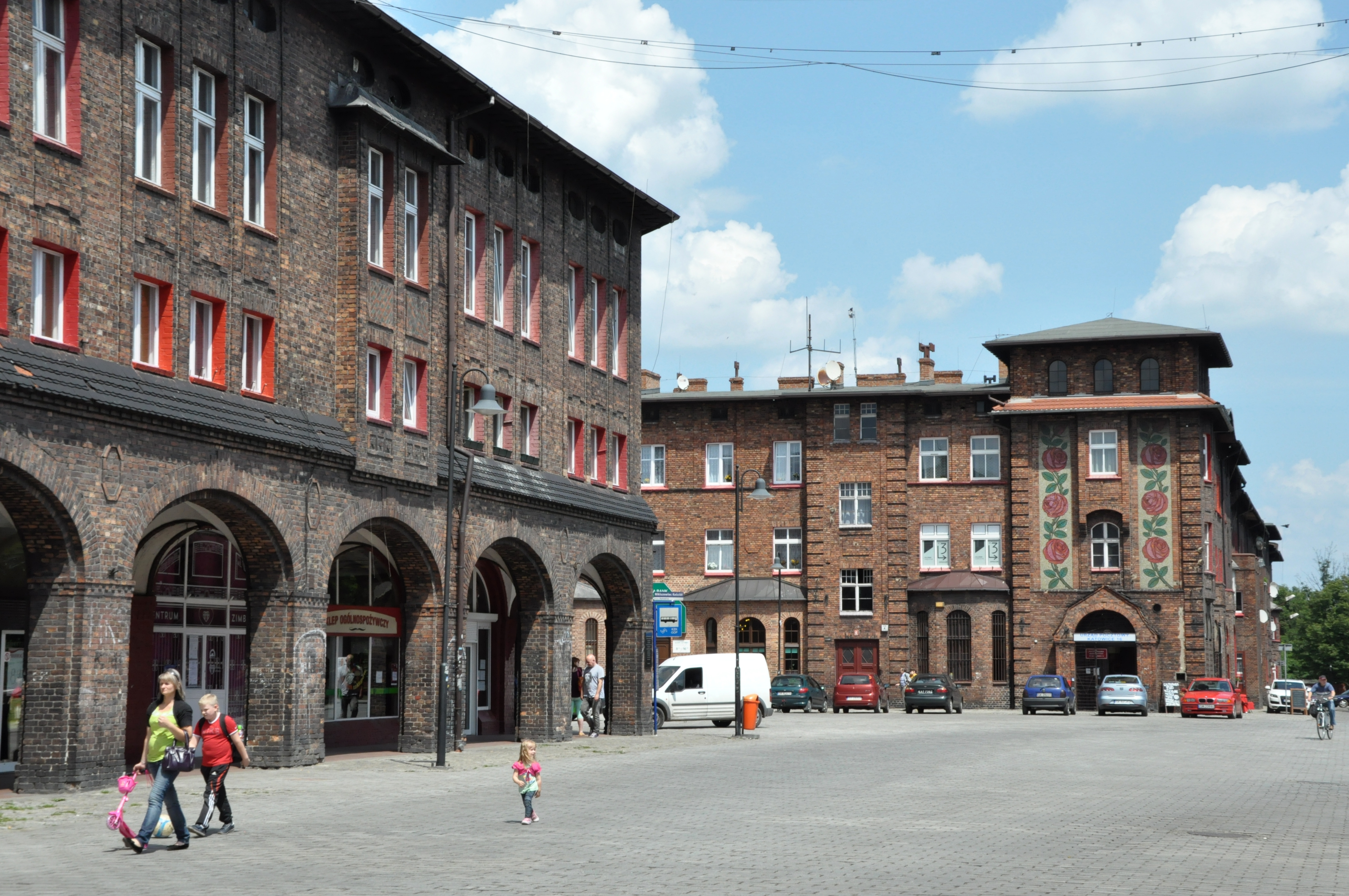 Osiedle Nikiszowiec, plac Wyzwolenia, widok w kierunku budynku dawnej gospody.